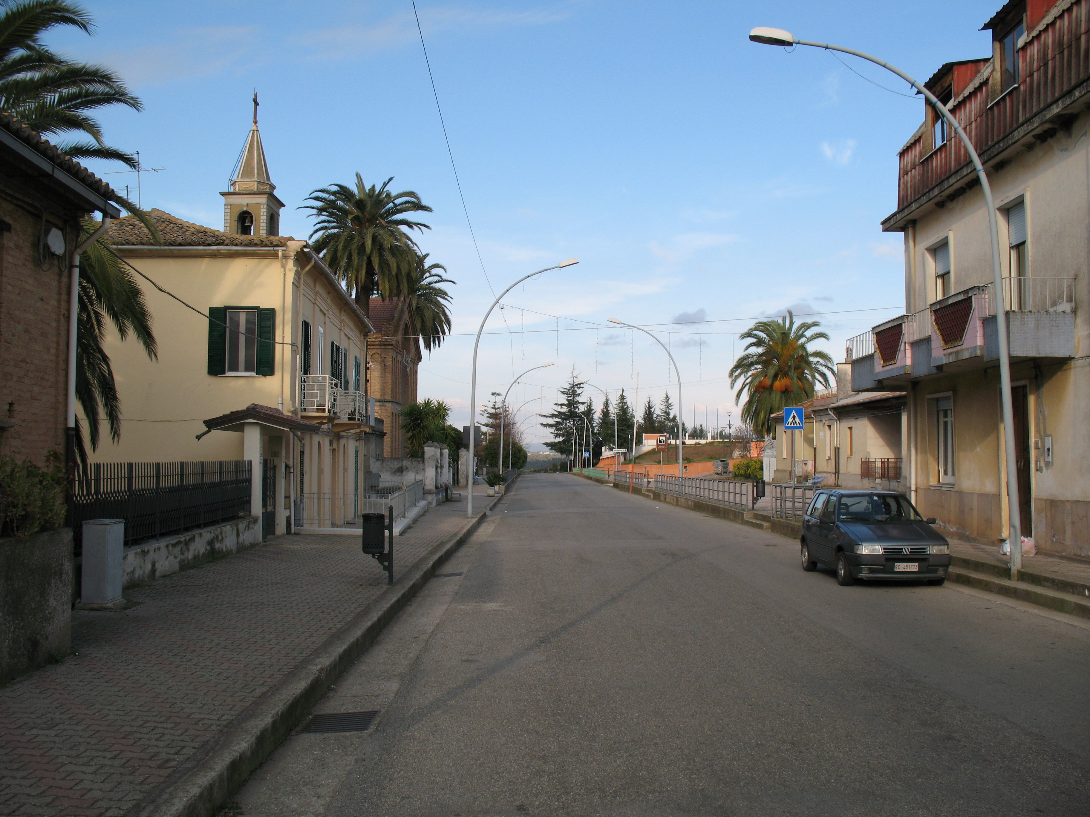 Terranova Sappo Minulio, SP1dir